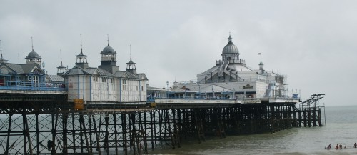 Das Pier von Eastbourne von Benutzer:Spit